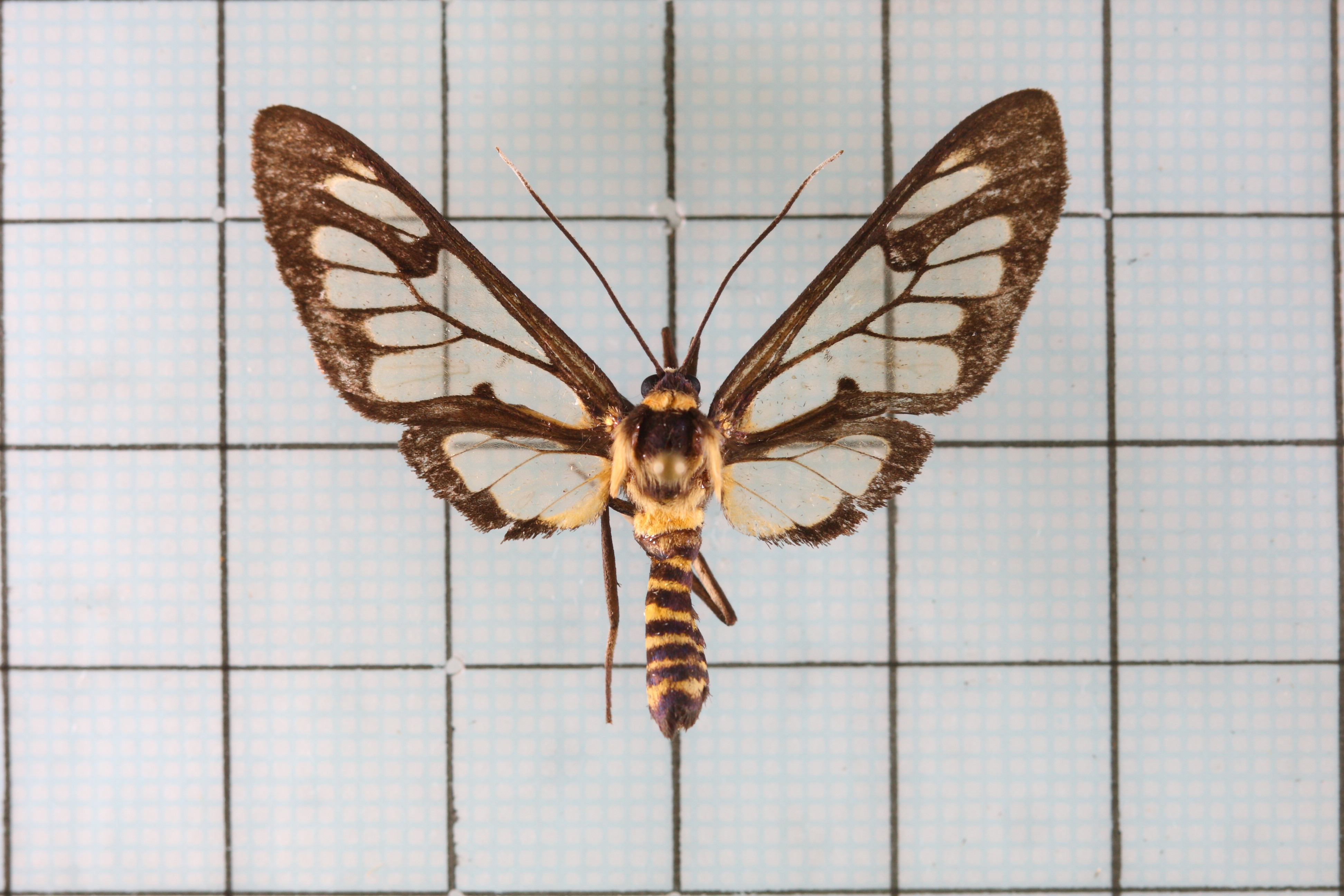 Caeneressa diaphana (Kollar, [1844]) 清新鹿蛾 認識台灣的昆蟲 7 燈蛾科:P.185